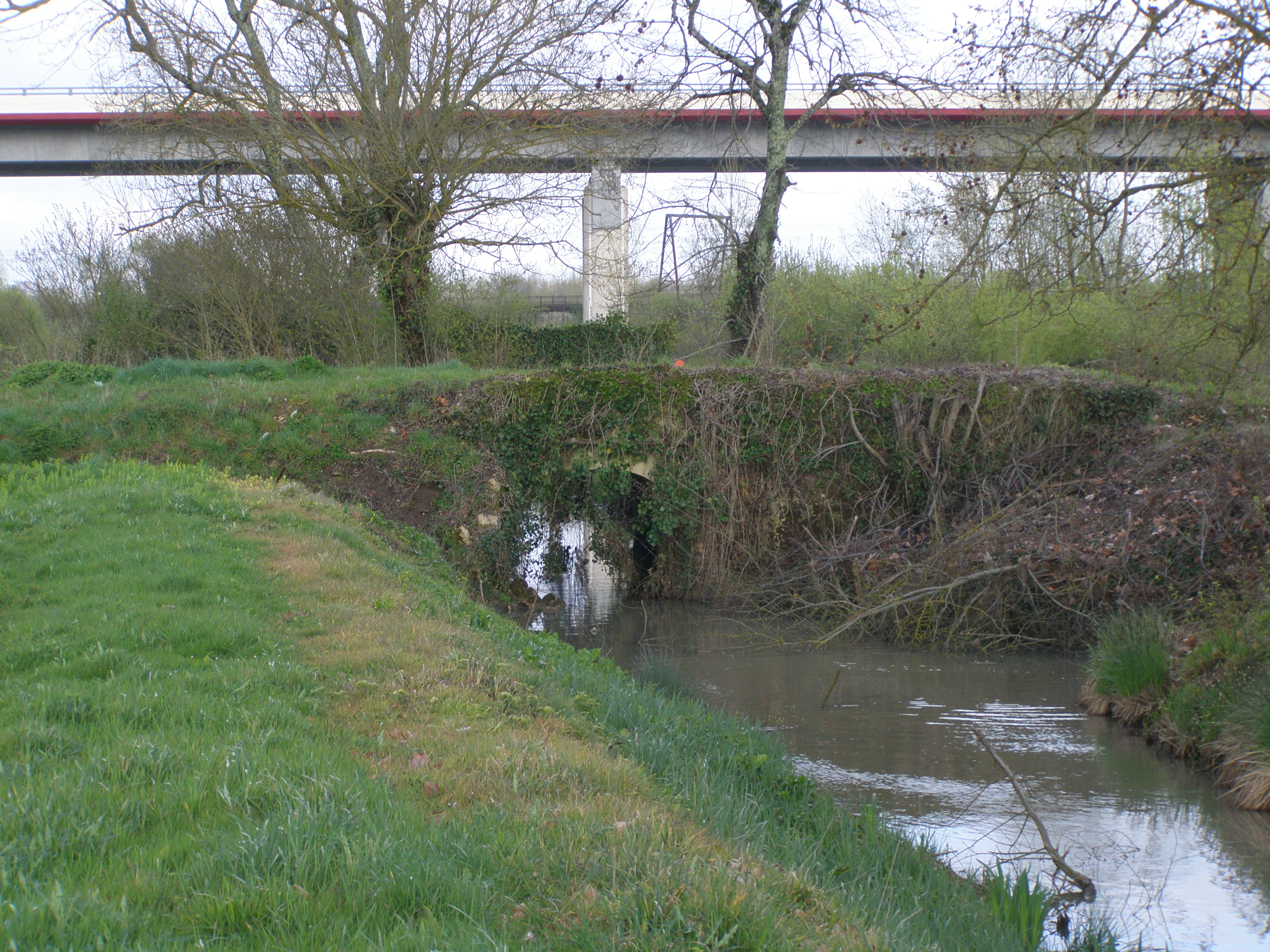 Vue du site de l'ancienne commanderie du viaduc